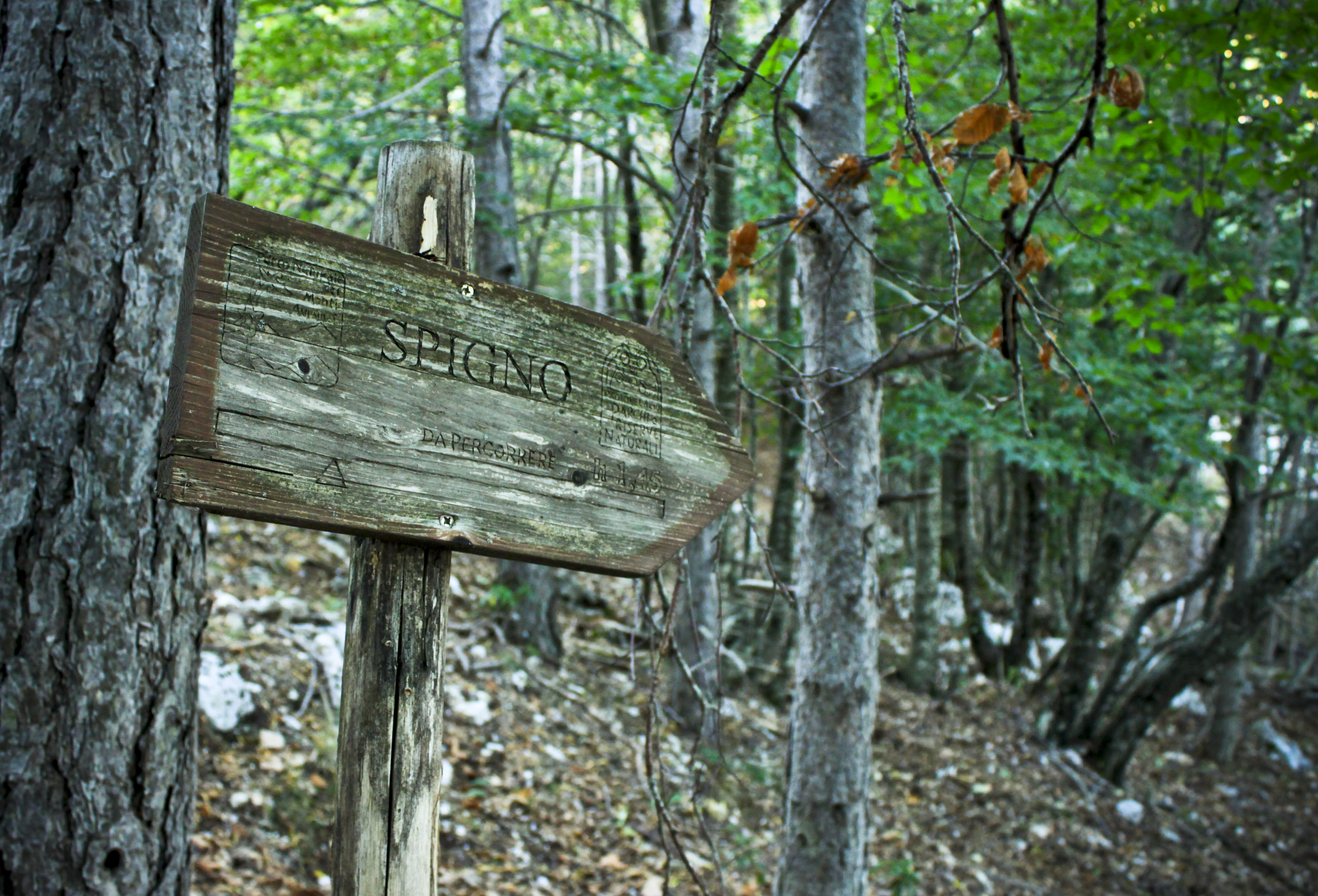 Fotografia di Gabriele Altimari